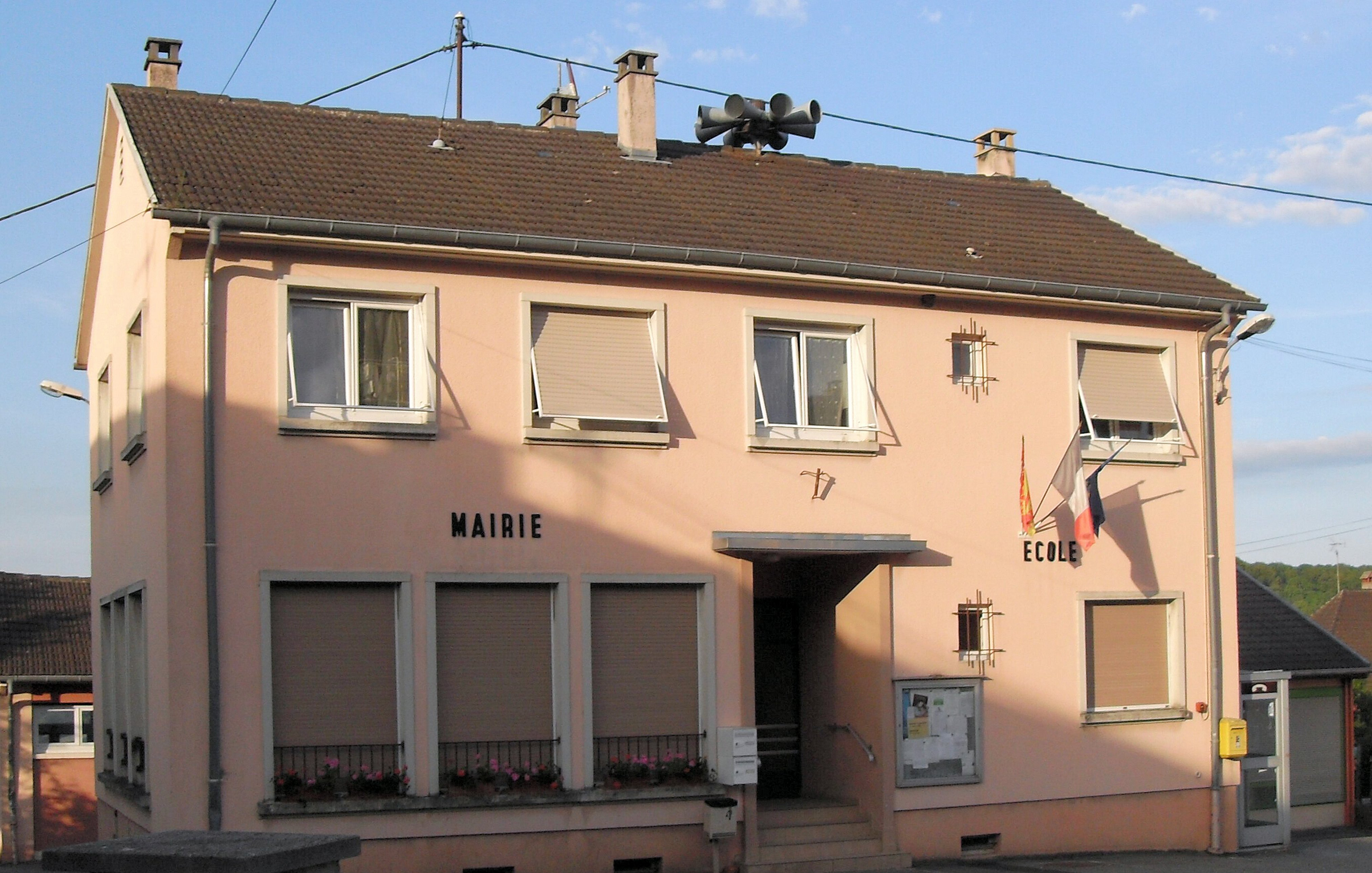 La mairie-école de Strueth